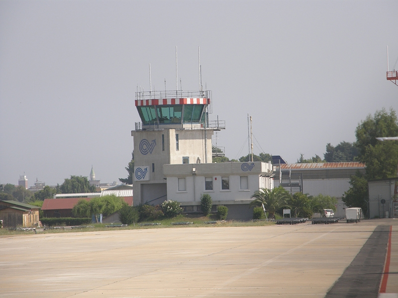 Pescara Airport